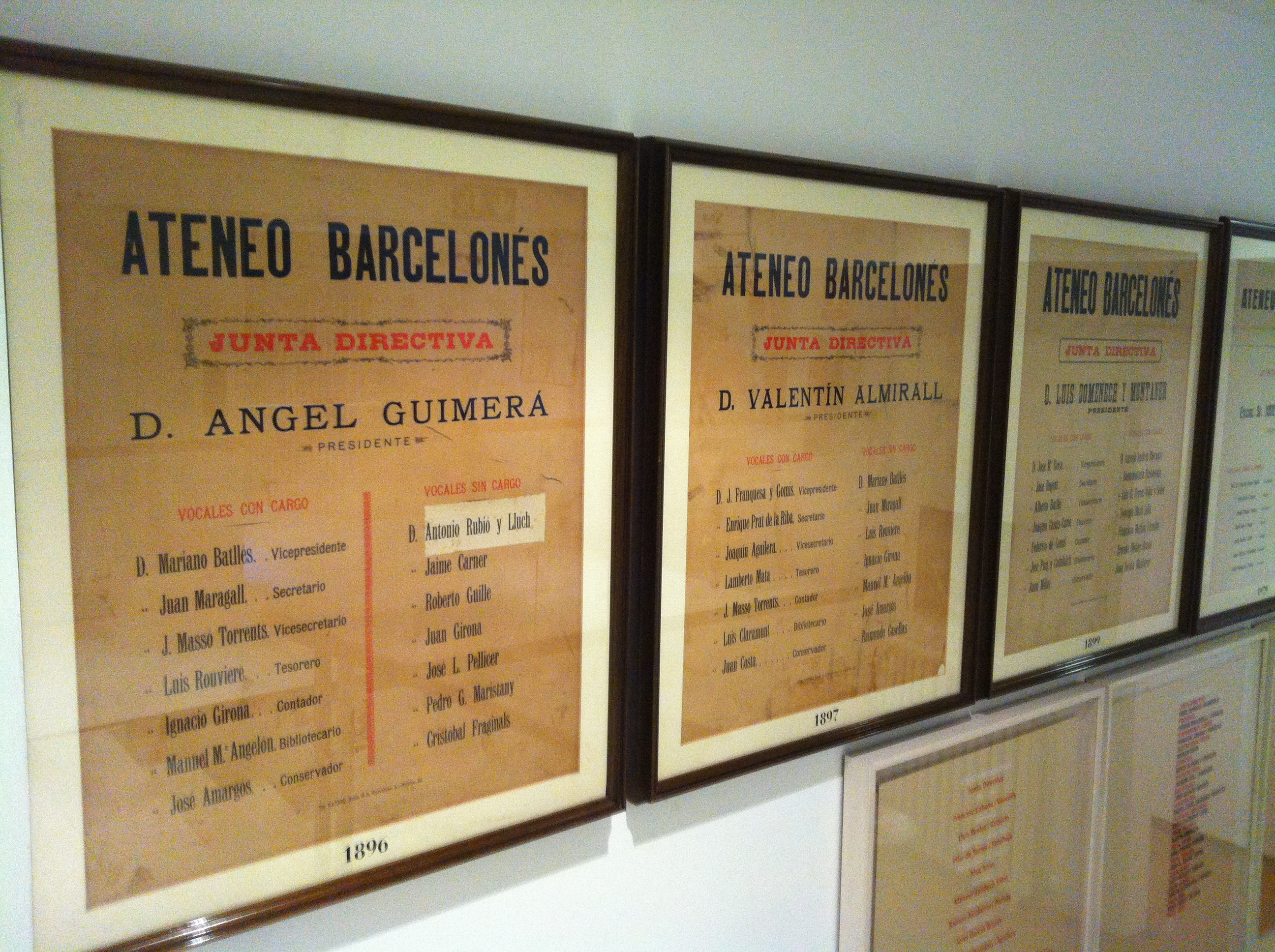 Ateneu Barcelonès junta directiva. Cartells antics